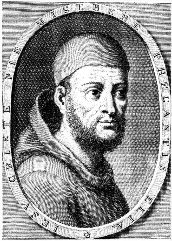 Copia posteriore di un ritratto del frate francescano Elia da Cortona effettuato dal pittore Giunta Pisano, proveniente da una biografia scritta sul Magazzino toscano d'instruzione e di piacere, edito a Livorno da Anton Santini e compagni, 1755, tomo II, pagina 390: la figura è circondata dalla scritta «Iesu Christe pie miserere precantis Elias», che faceva parte della firma apposta dal pittore sul Crocifisso di Frate Elia, da lui sagomato nel 1236 e in seguito andato perduto.